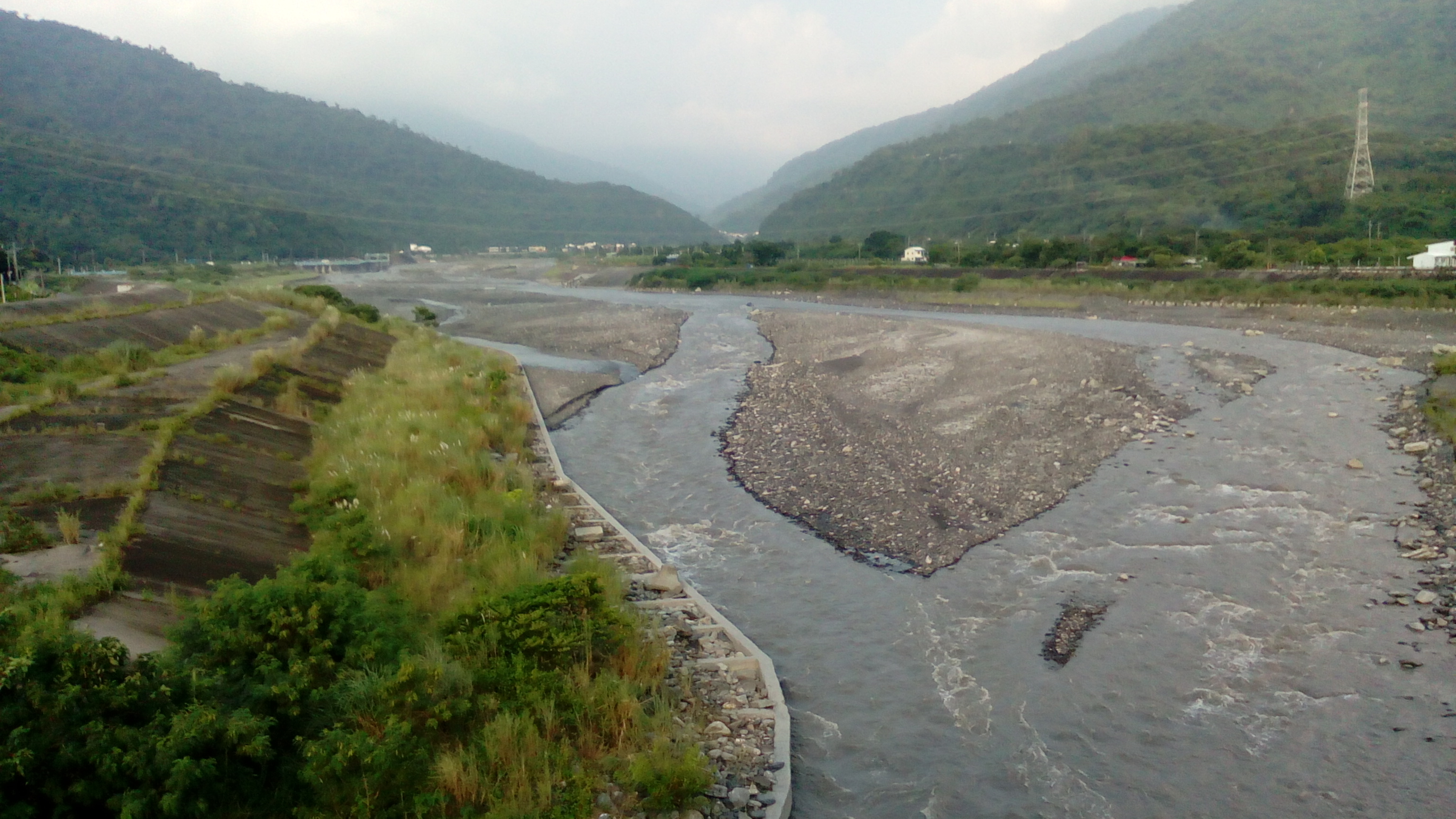 古樓村流域